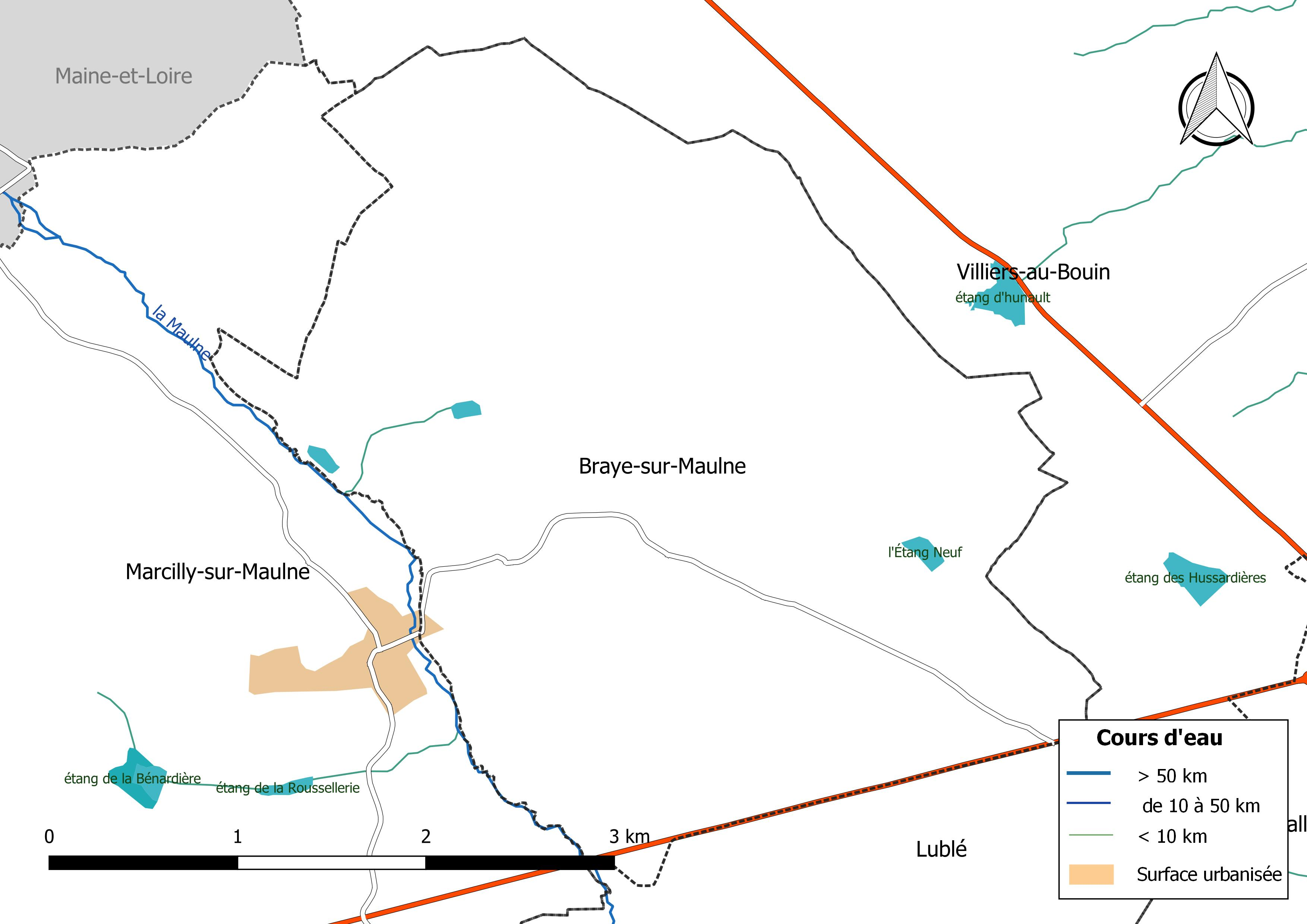 Carte du réseau hydrographique de la commune de Braye-sur-Maulne (France).